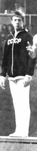 Zentralbild-AP-Tele-16.5.71-wen-Madrid: 9. Turn-Europameisterschaften der Herren am 14. und 15.5.71-Siegerehrung im Barrenturnen am 15.5.71 v.r.n.l.: Der Italiener Giovanno Carlixnucot (1. Pl. ) und auf den 2. Platz von Woronin (UdSSR), Klaus Köste (DDR) und Adrianow (UdSSR)